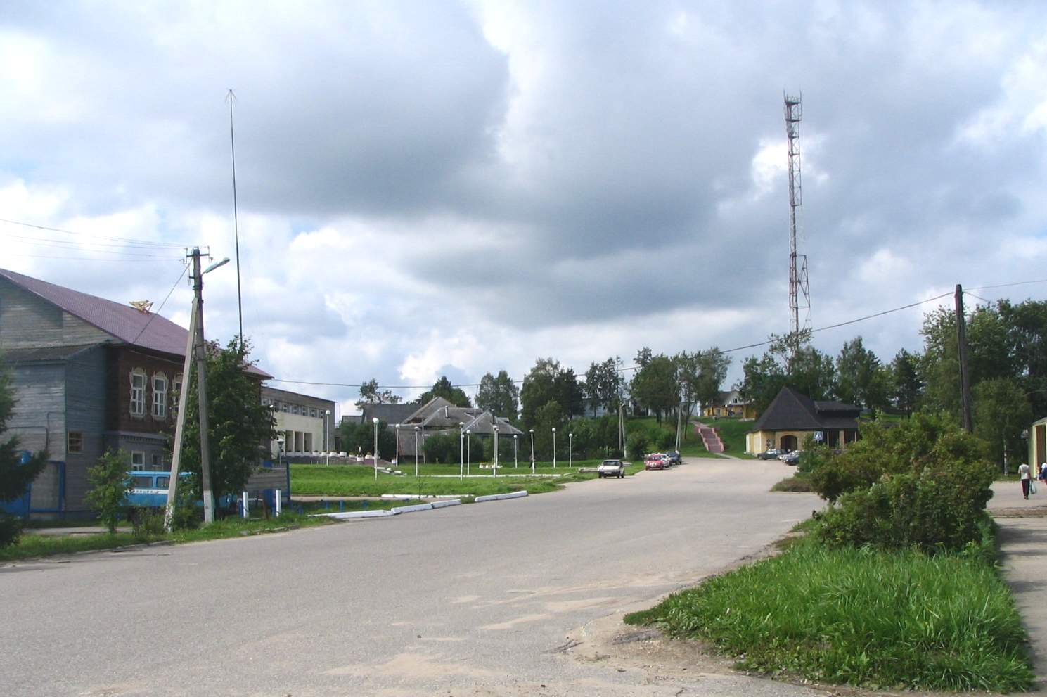 Центр посёлка Кесова Гора (Тверская область, Россия).